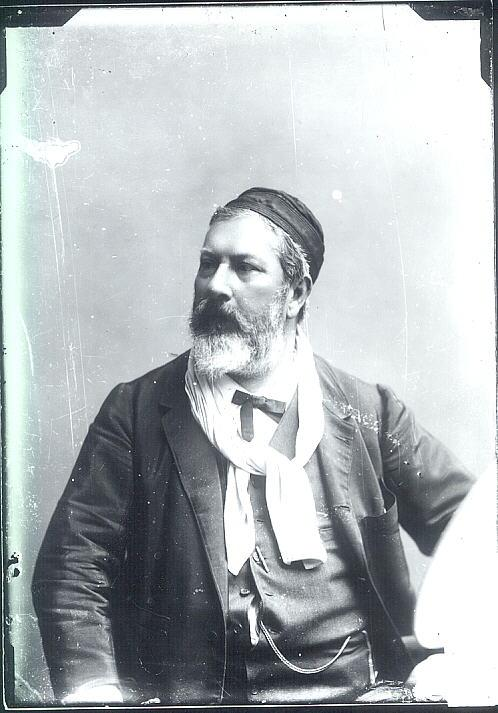 Self-portrait